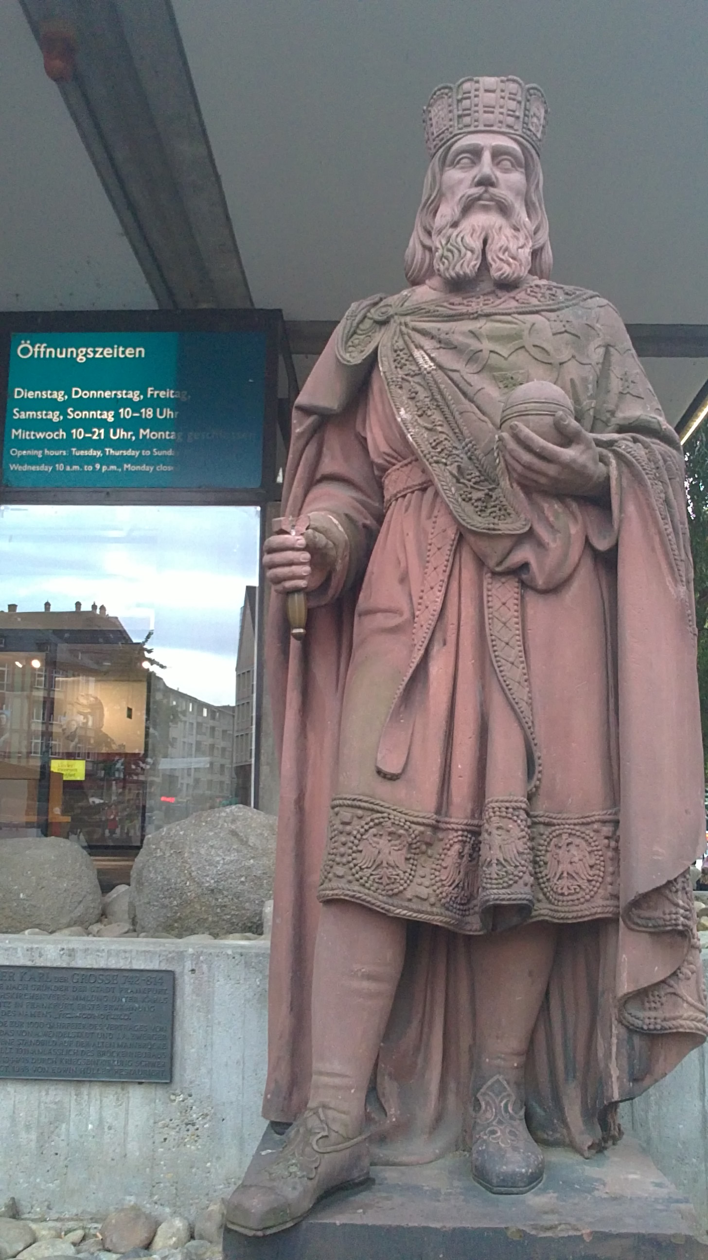 Frankfurdi linna asutaja, Karl Suure, kuju linna keskväljaku Römerbergi ääres